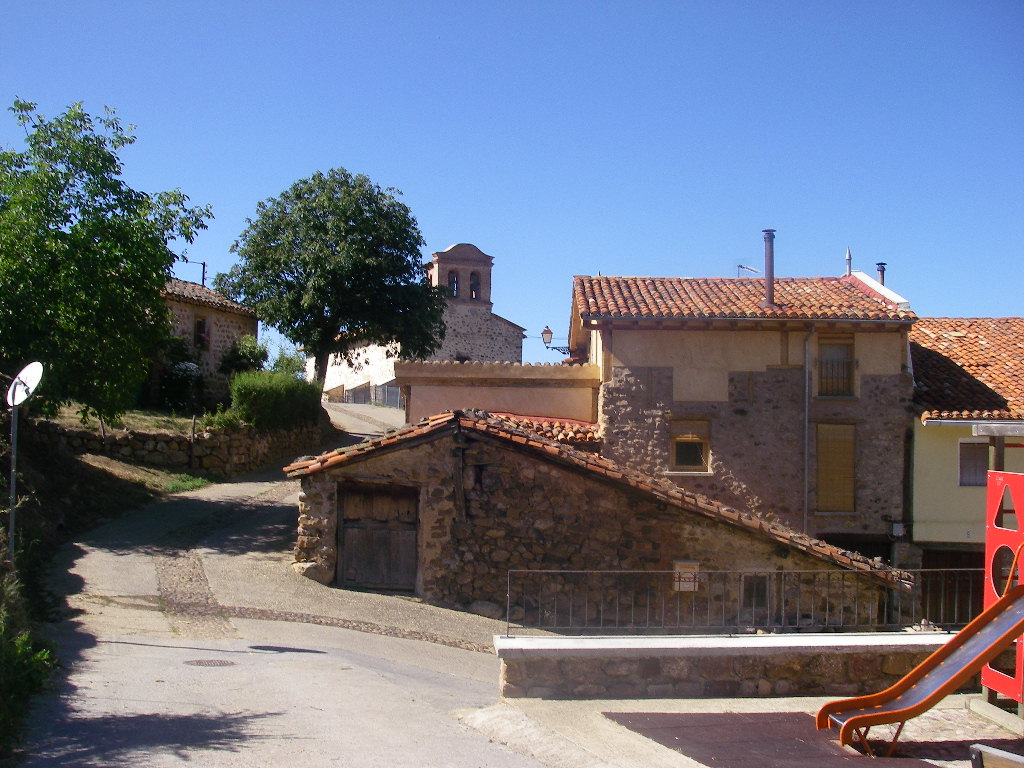 Vista de Peñaloscintos desde una de sus plazas.